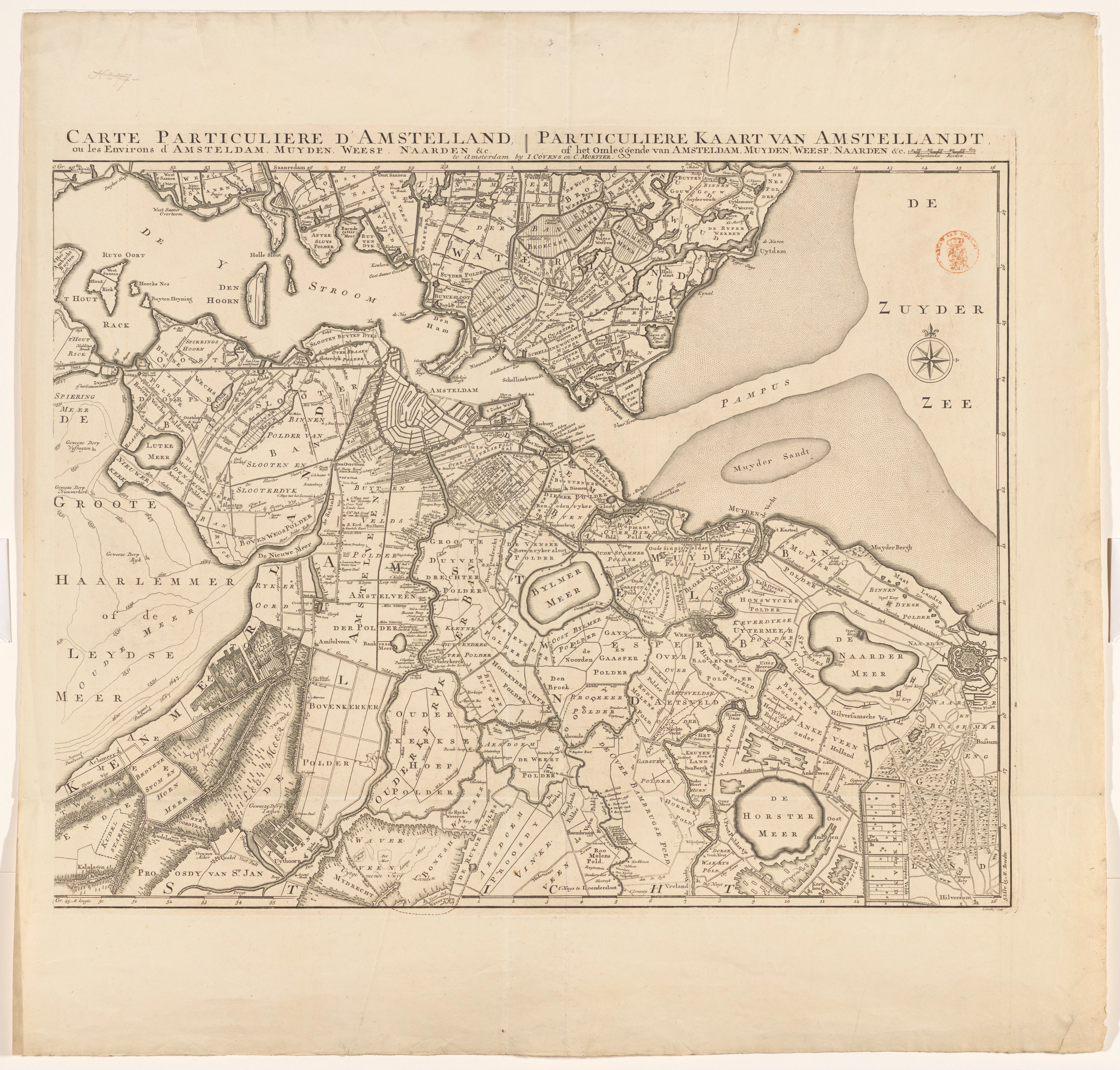 IdentificatieTitel(s): Kaart van AmstellandParticuliere kaart van Amstellandt of het omleggende van Amsterdam, Muyden, Weesp, Naarden &c / Carte particuliere d'Amstelland ou les environs d'Amsterdam, Muyden, Weesp, Naarden &c (titel op object)Objecttype: prent kaart Objectnummer: RP-P-AO-6-33Opschriften / Merken: verzamelaarsmerk, recto rechtsboven, gestempeld: Lugt 19Omschrijving: Rechtsboven een schaalstok: Rhynlandse roeden. Gradenverdeling langs de randen. Oriëntatie: noorden rechts.VervaardigingVervaardiger: prentmaker: Johannes Condet (vermeld op object)uitgever: Covens & Mortier (vermeld op object)Plaats vervaardiging: AmsterdamDatering: 1749Fysieke kenmerken: gravureMateriaal: papier Techniek: graveren (drukprocedé)Afmetingen: plaatrand: h 513 mm × b 638 mmOnderwerpWat: maps of separate countries or regionsWaar: AmstellandVerwerving en rechtenVerwerving: overdracht van beheer 1887Copyright: Publiek domein